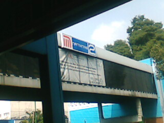 Estacion Nativitas